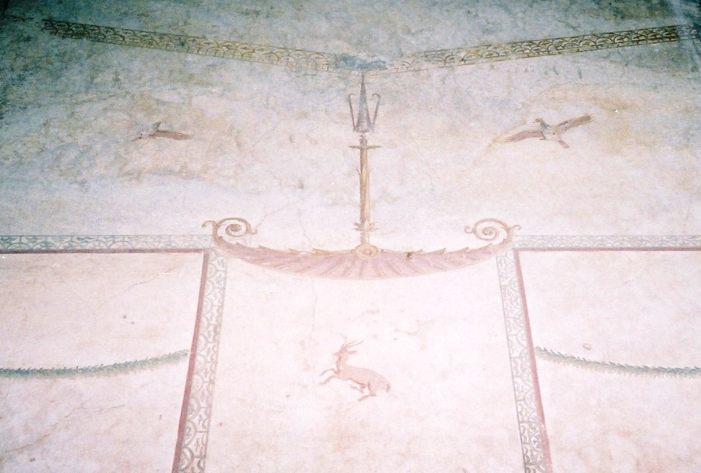 Détail d'une fresque de la villa de Poppée à Oplontis